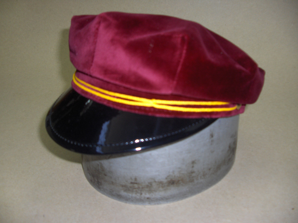 Czapka_studencka_CMUJ